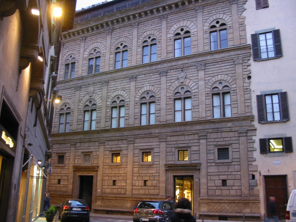 Palazzo Rucellai di Firenze